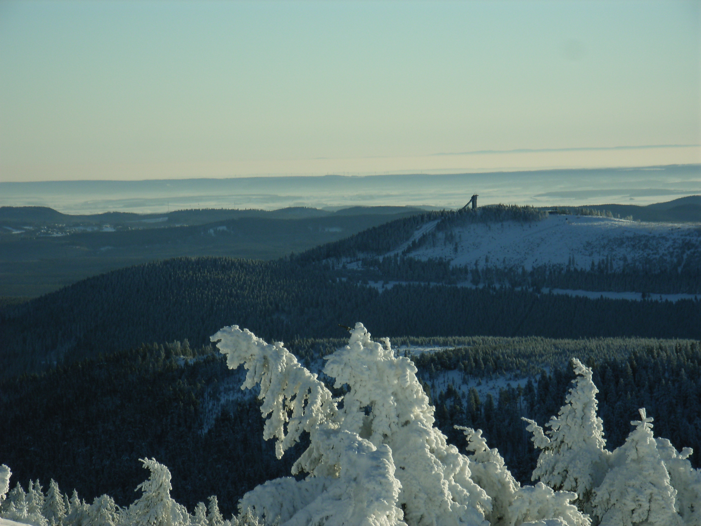 Blick auf die Wurmbergschanze vom Brocken aus gesehen